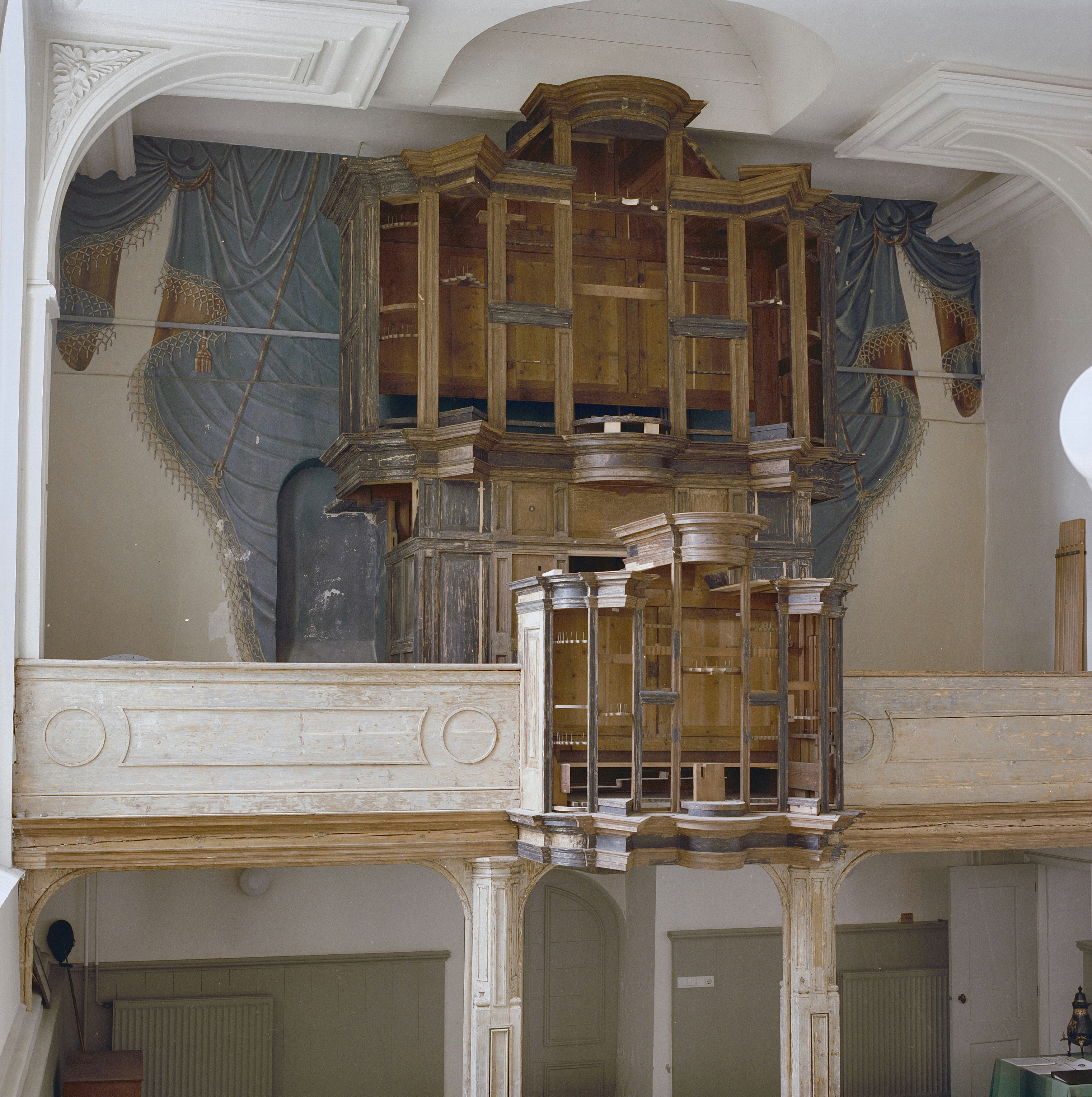 Heilige Geest- of Pelstergasthuis: INTERIEUR, OVERZICHT ORGELKAST (LEEG), KLEURONDERZOEK